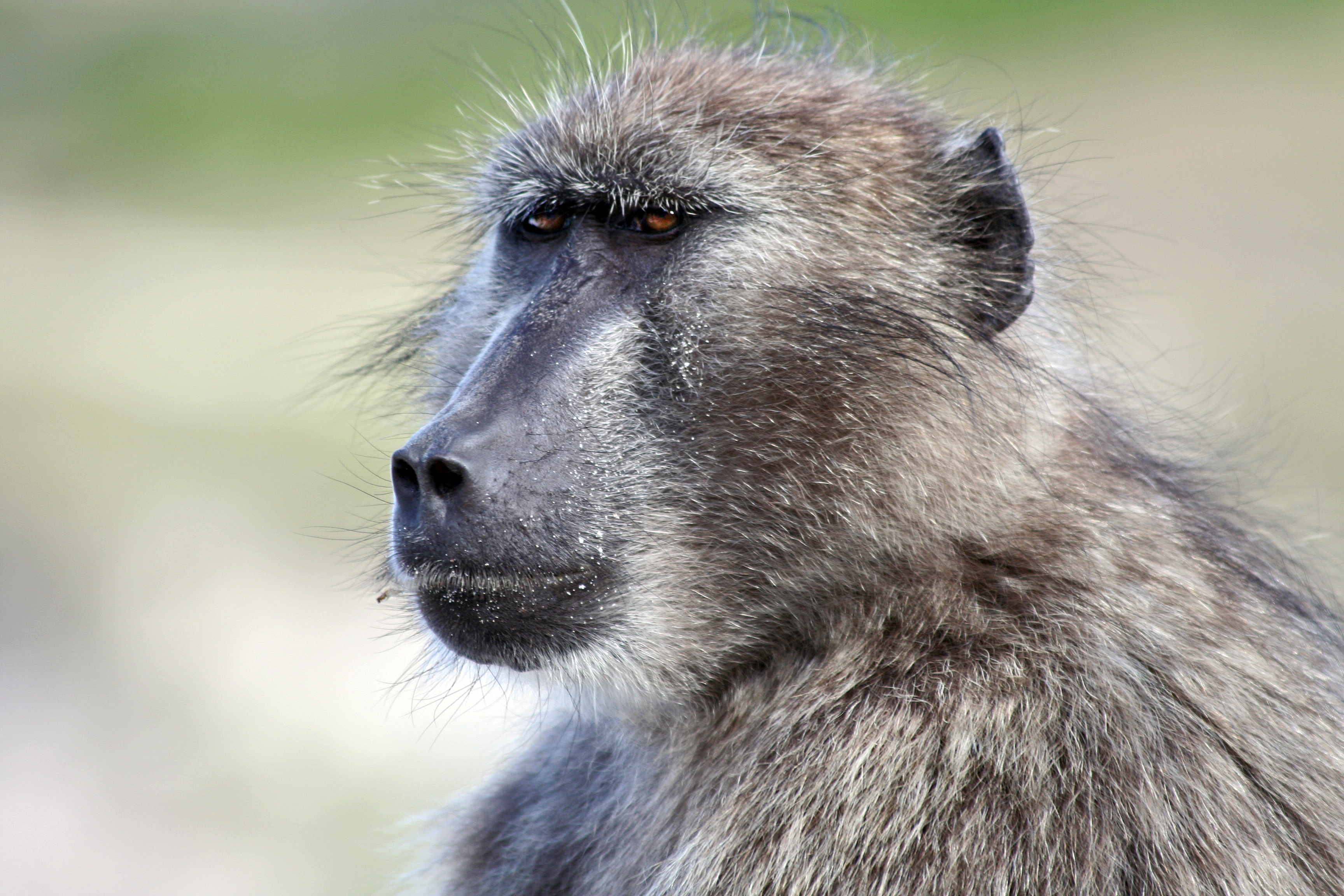 Kopf eines Bärenpavians.